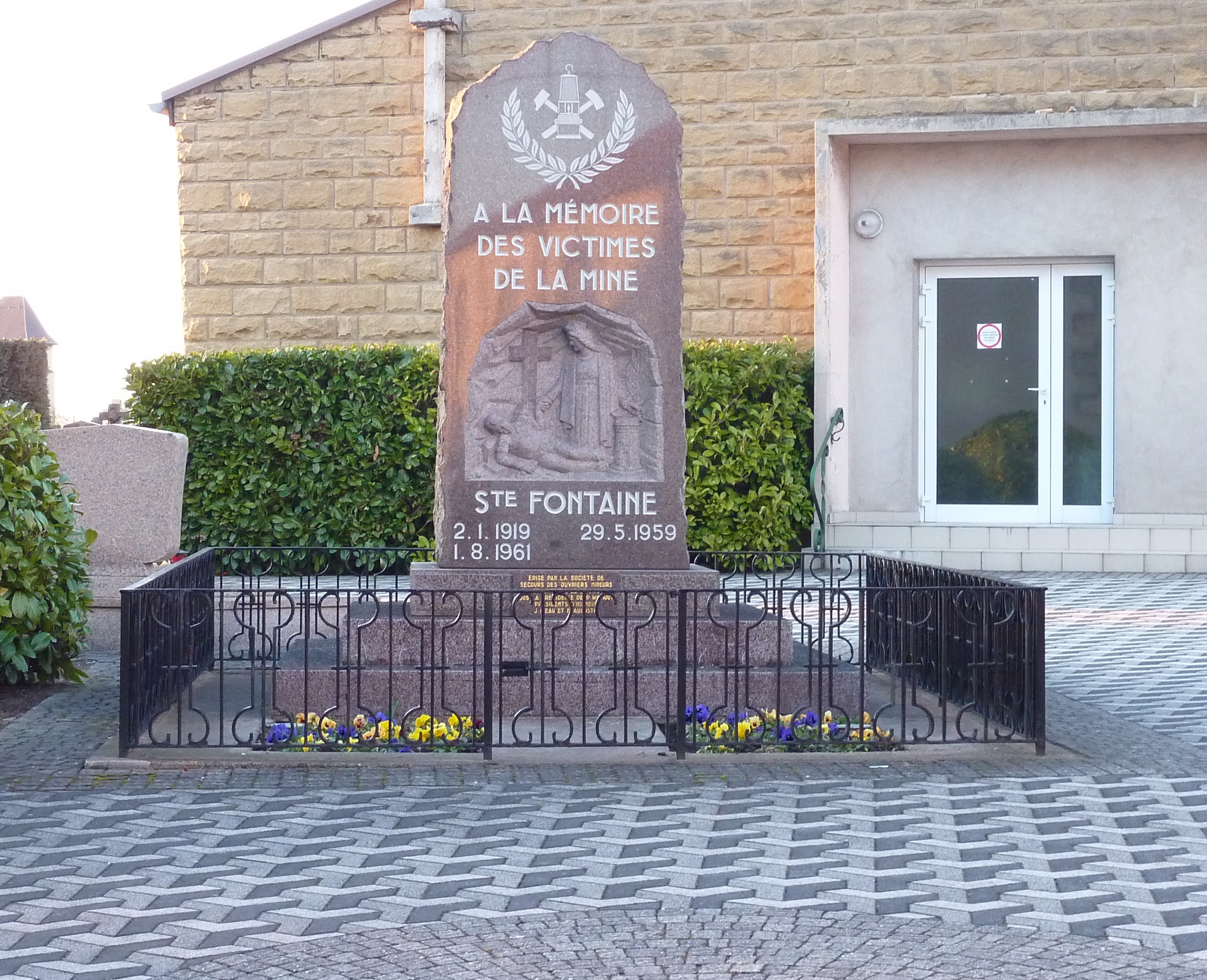 Monument des victimes de la mine